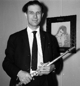 Huilutaiteilija Juho Alvas